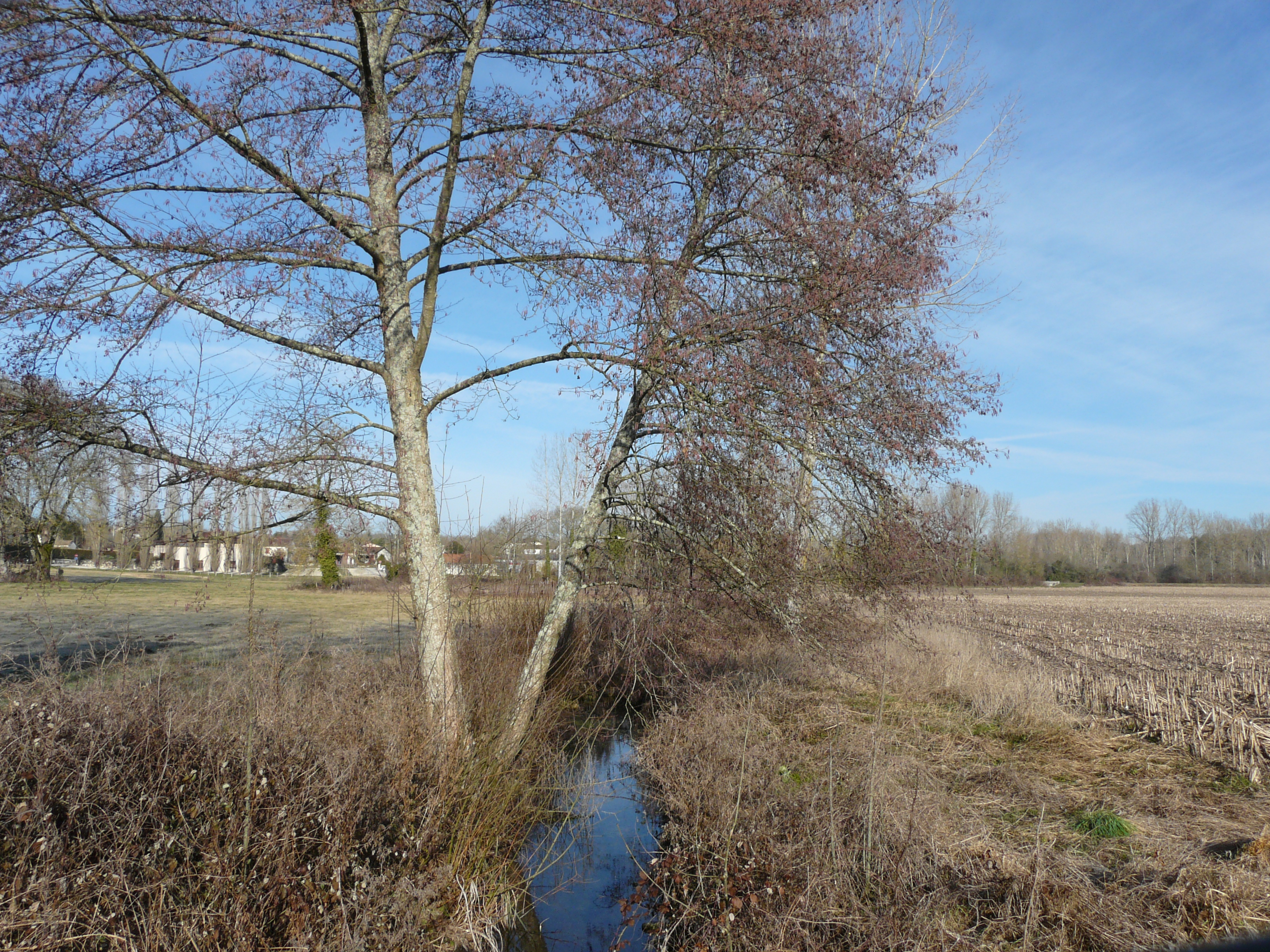 La Julie, une trentaine de mètres en amont du lavoir de La Tour-Blanche. Elle sépare les communes de La Tour-Blanche à gauche et Cercles, à droite. Dordogne, France.